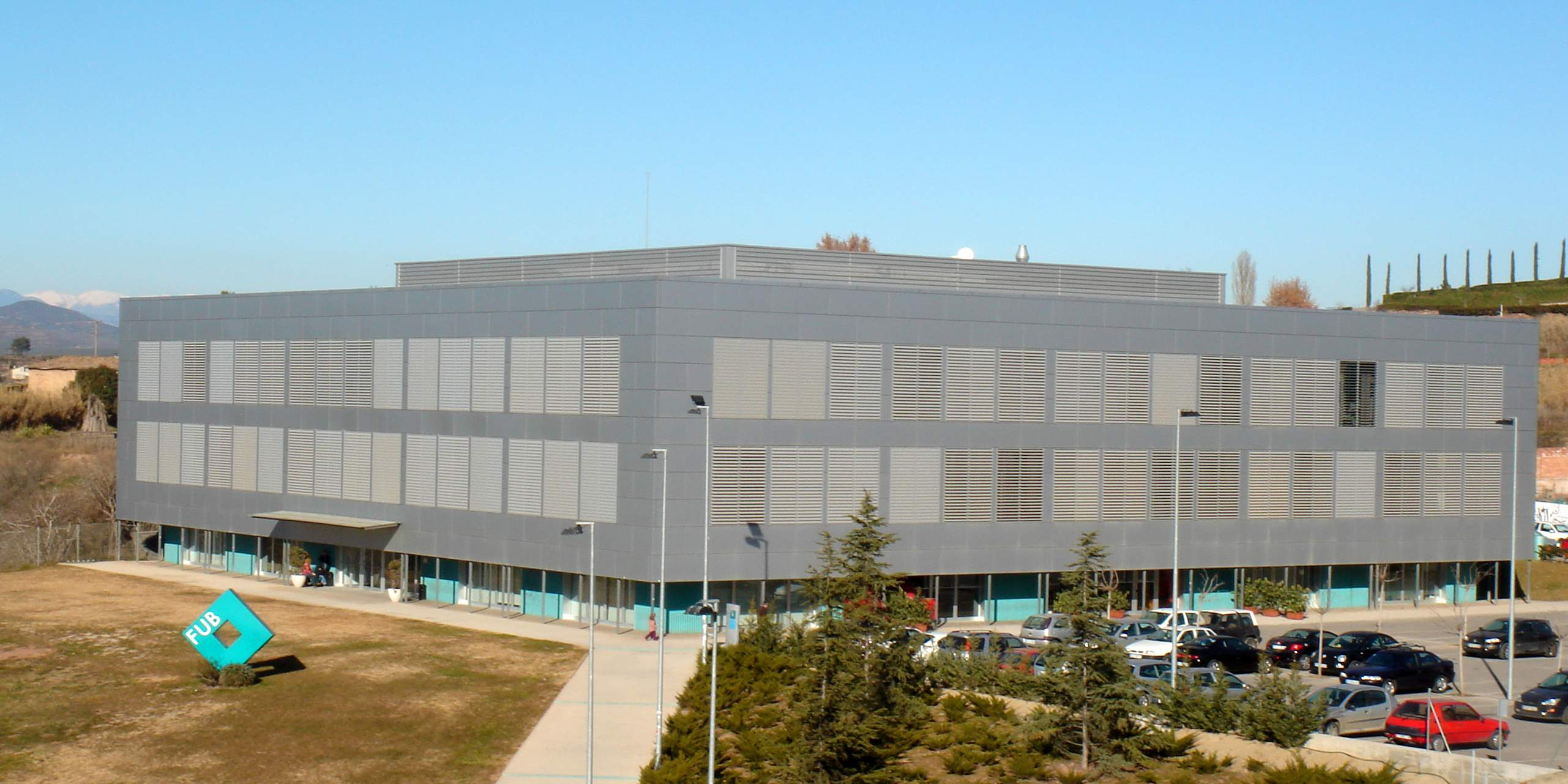 La Fundació Universitària del Bages (FUB) és una fundació privada amb vocació de servei públic que té com a objectiu principal garantir una oferta d'estudis superiors a les comarques centrals de Catalunya que contribueixi al reequilibri territorial en el conjunt del país. Ubicada a Manresa (Bages), la FUB imparteix estudis d'Infermeria, Fisioteràpia, Logopèdia, Podologia, Gestió d'Empreses i Educació Infantil. Es tracta d'ensenyaments homologats i adscrits a la Universitat Autònoma de Barcelona (UAB).